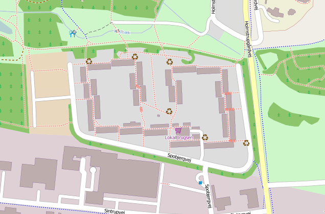 Denne fil er lavet som et screenshot af Open Street Map, der viser Skjoldhøjkollegiet fra oven.